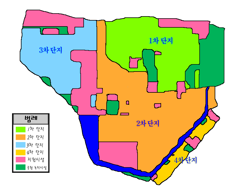 대구 성서산업단지 배치도대구성서산업단지관리공단에서 배포한 성서 1차~4차단지 배치도 직접 제작